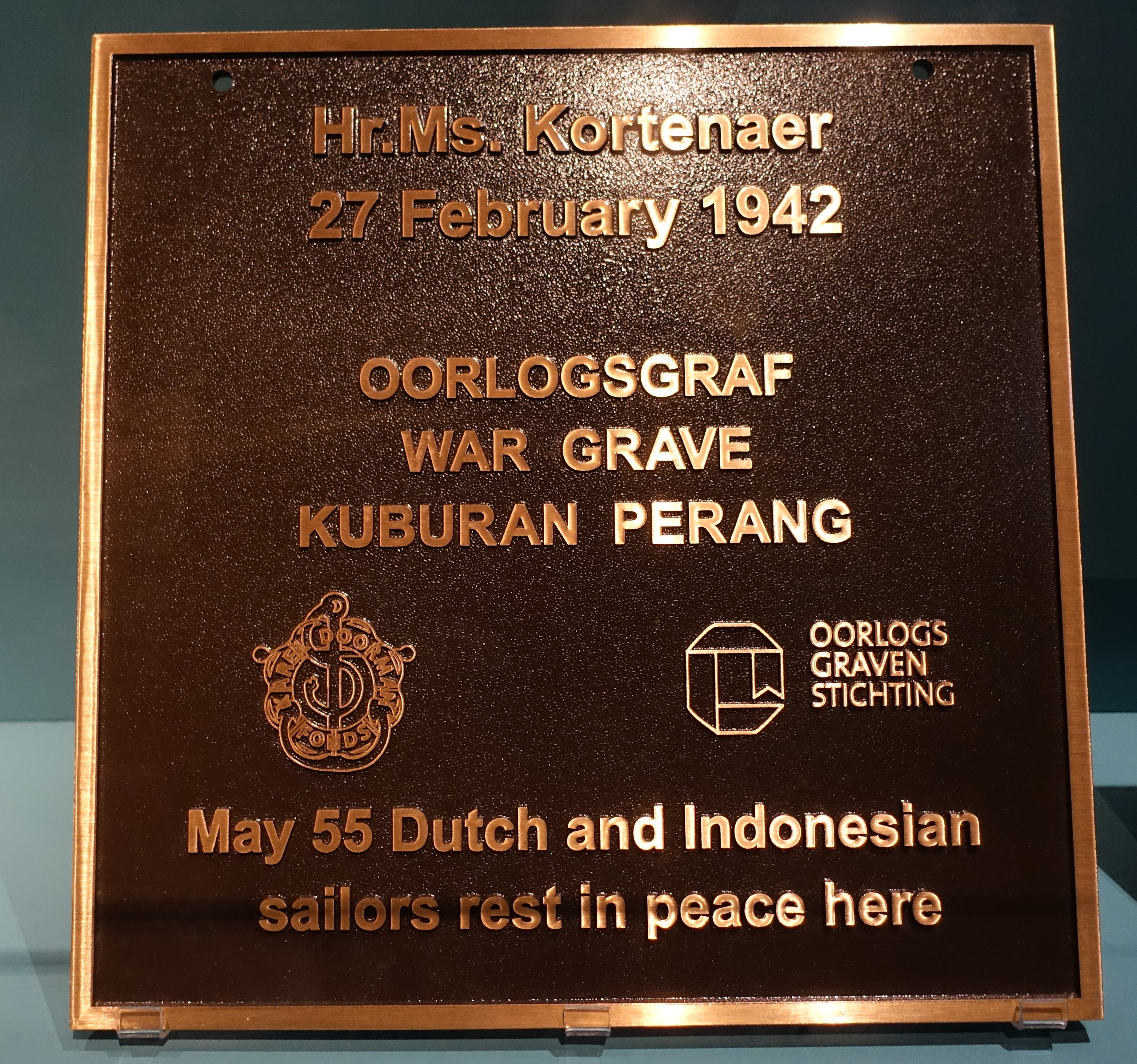 Herdenkingsbord MS Kortenaer Marinemuseum. Een herdenkingsplaquette voor het oorlogsgraf kon niet meer op het schip geplaatst worden omdat het wrak van het schip in 2016 bleek te zijn verdwenen. Dit bevindt zich in 2017 in het Marinemuseum in Den Helder.